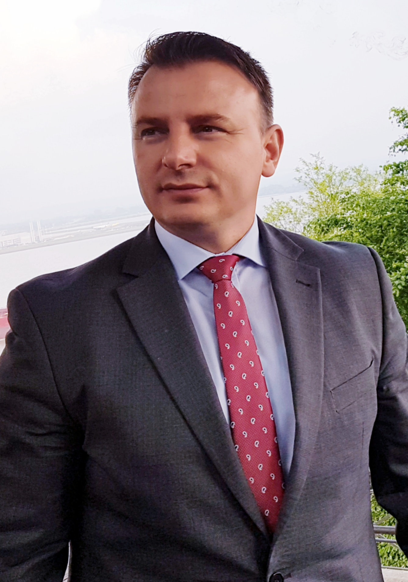 Astrit Zemaj, diplomat i Kosovës